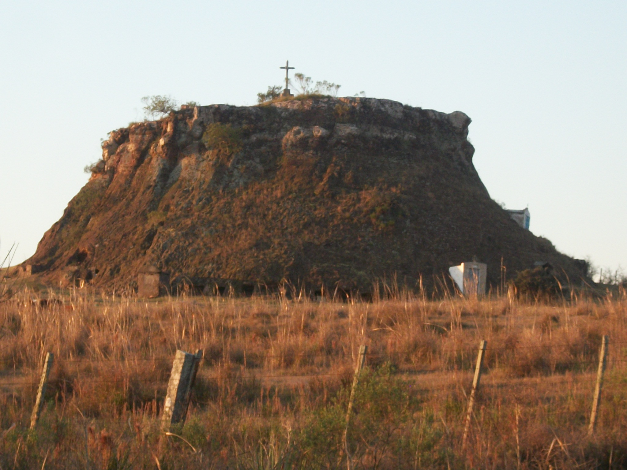 Cerro